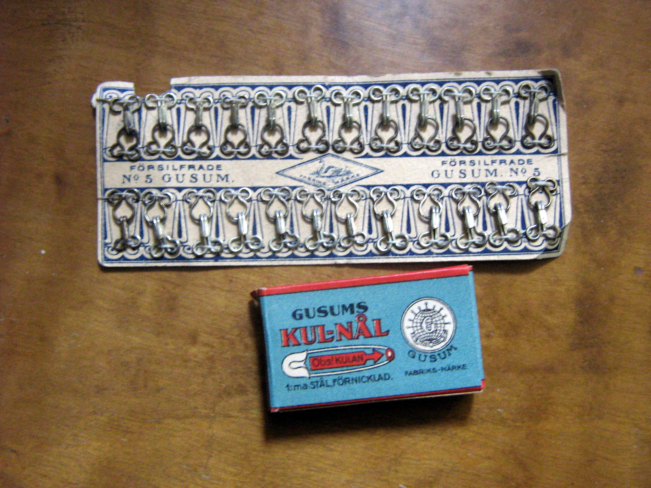 Gusumprodukter